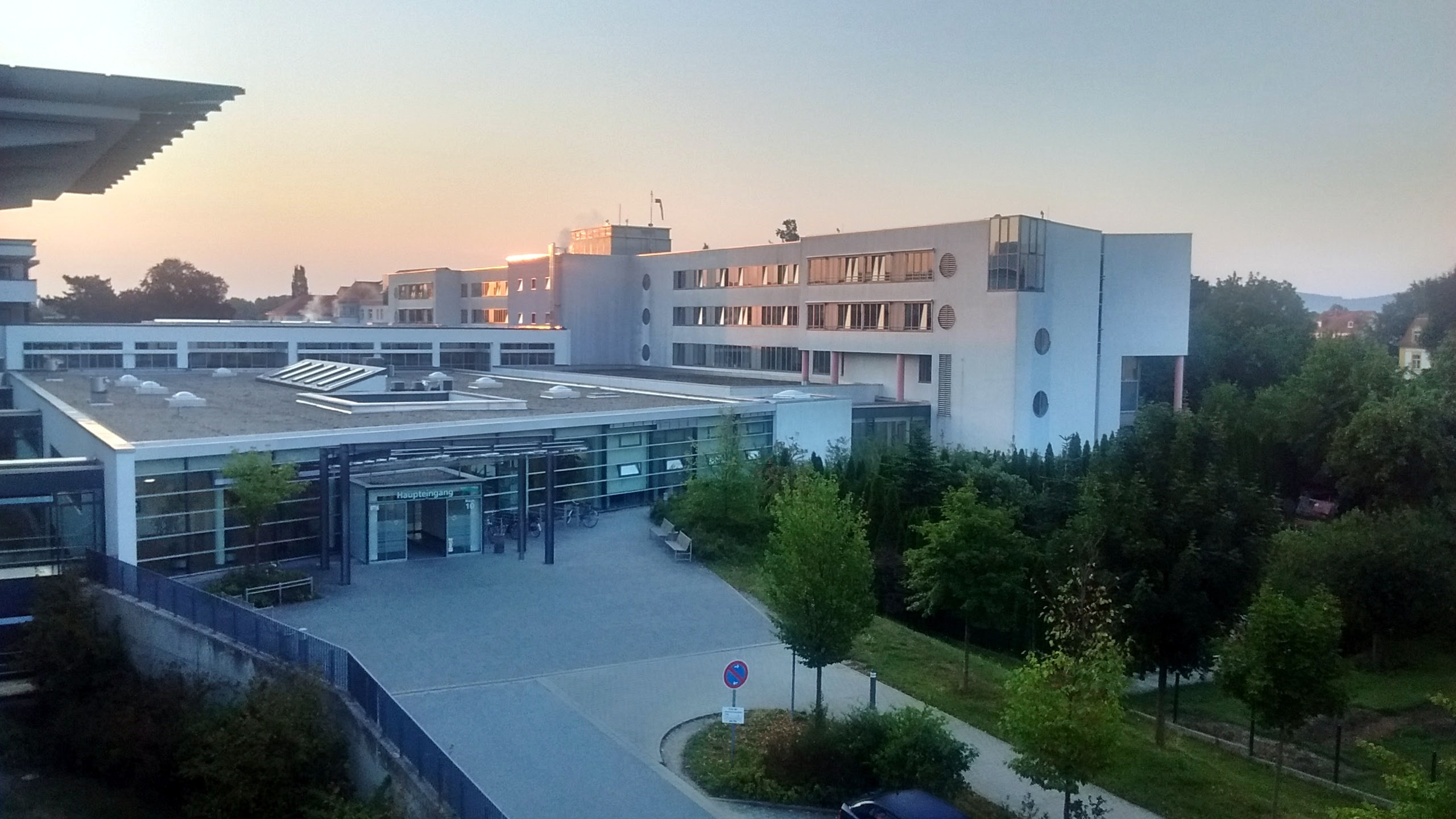 Haupteingang der Oberausitz-Kliniken in Bautzen.